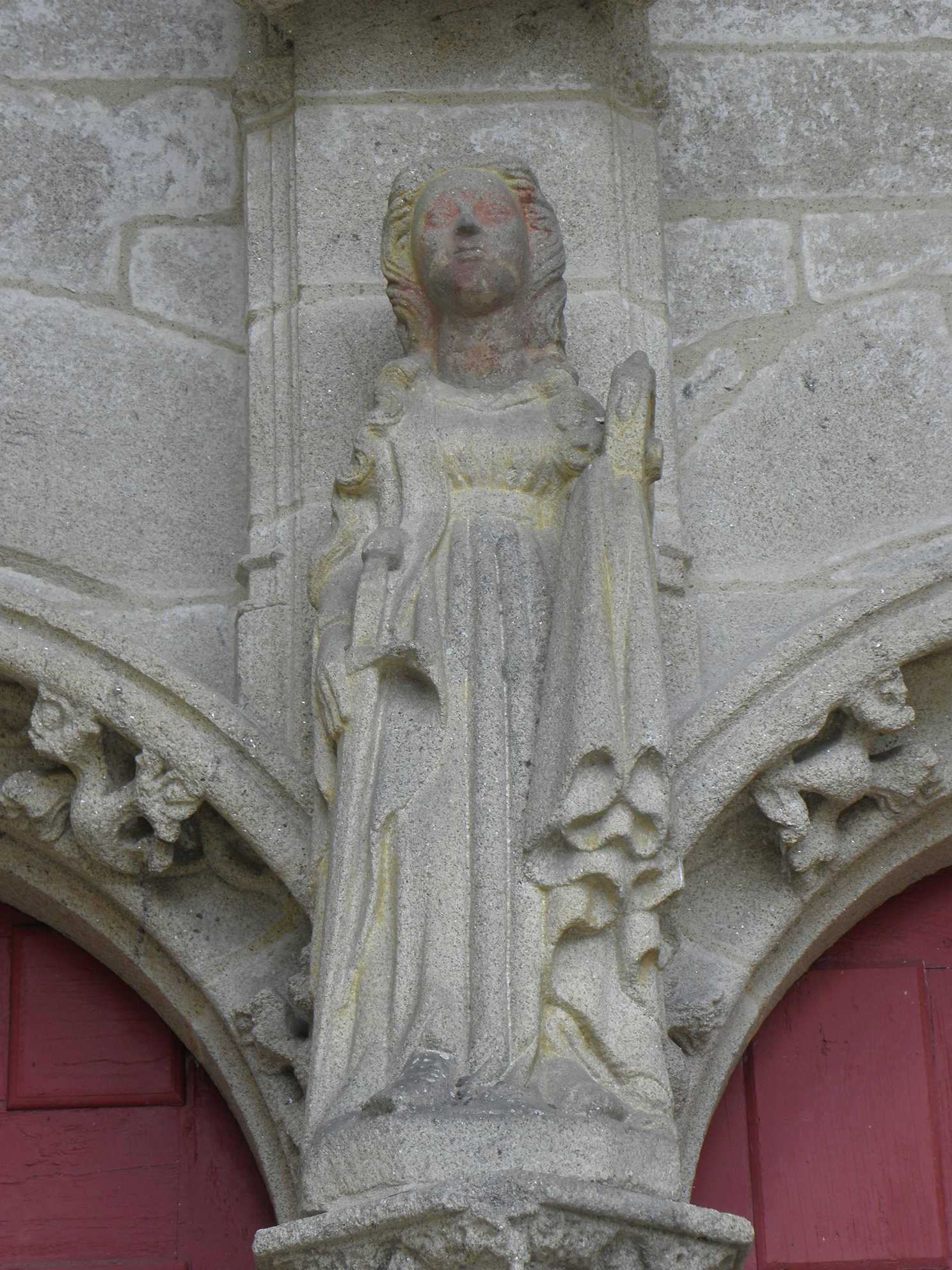 Statue de Sainte-Catherine-d'Alexandrie au porche des hommes de la chapelle Notre-Dame de Kernascléden (56).